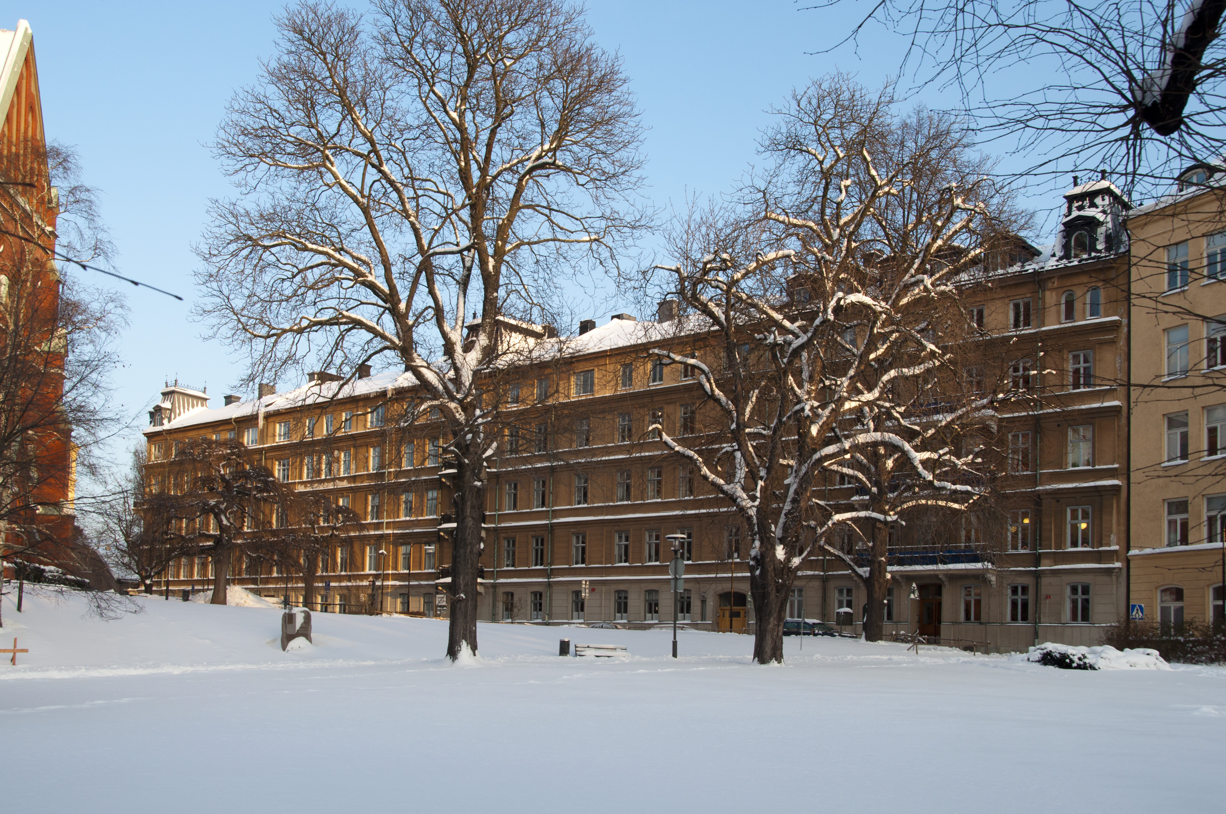 Johannesgatan 20-28. de Champskahusen, efter byggherren Charles Eugène de Champs. Byggnadsår 1874-79